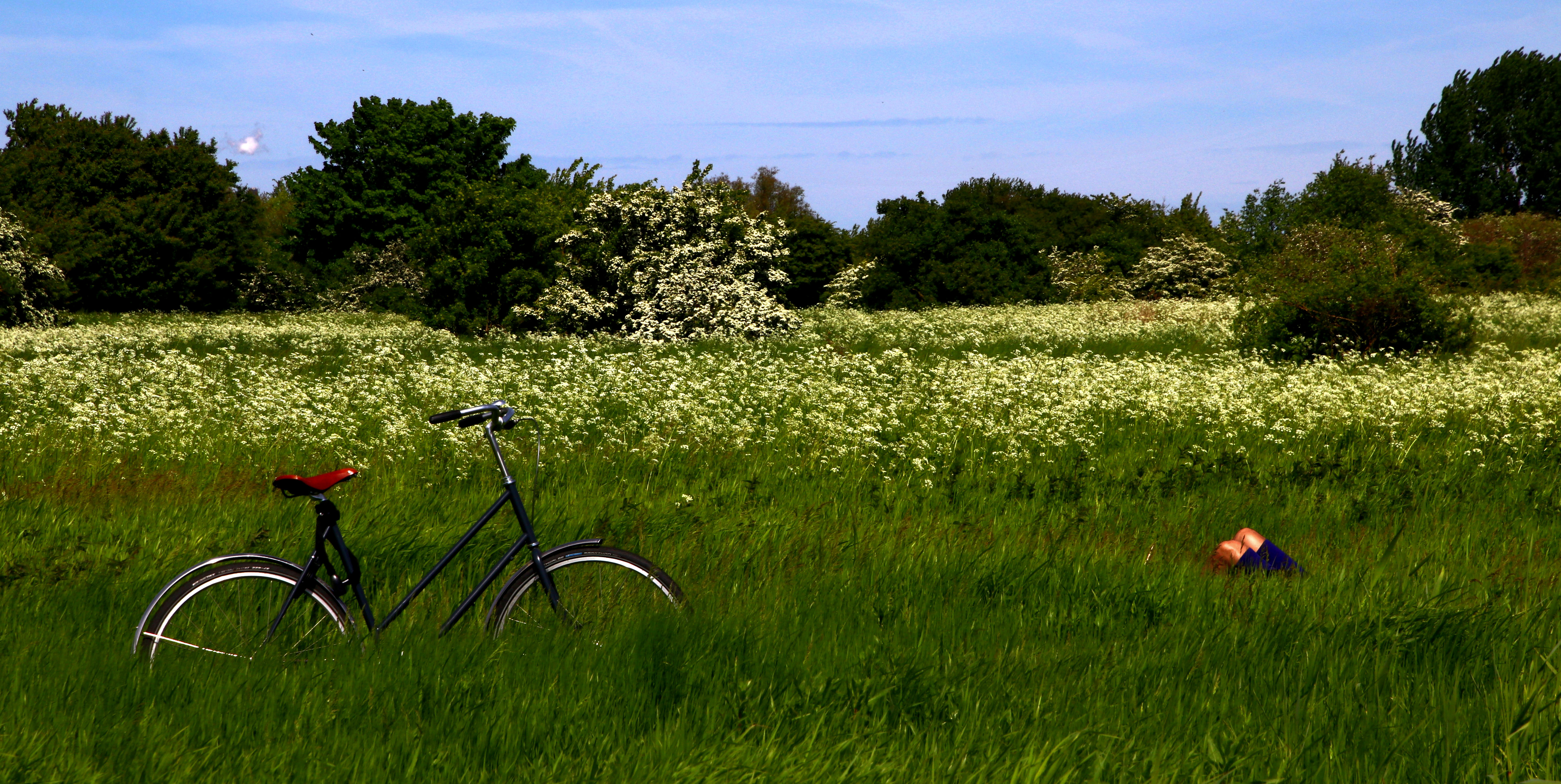 København / Copenhagen. På Amager Fælled.